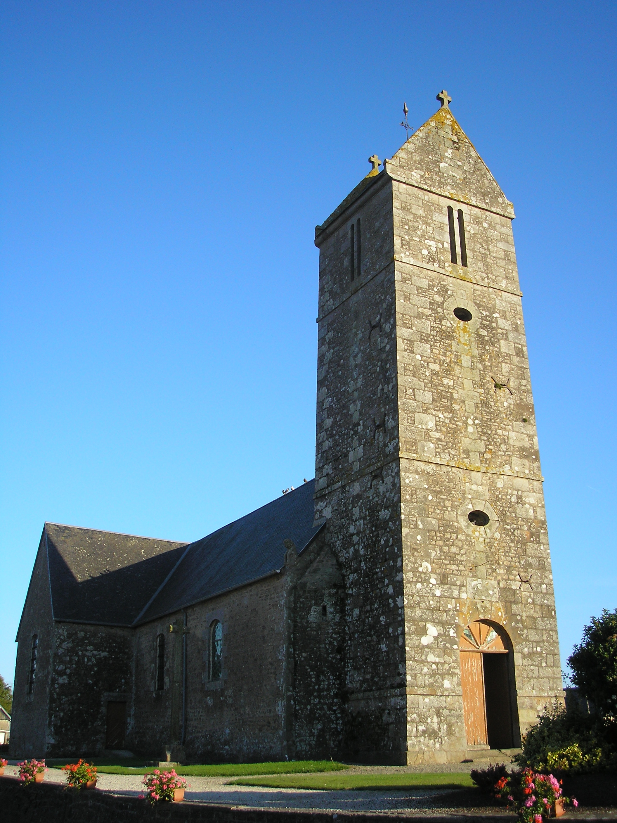 Isigny-le-Buat (Normandie, France). L'église Saint-Martin de Chalandrey.